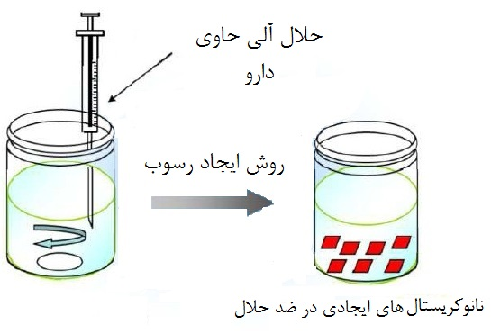 تولید نانوکریستالها به روش رسوبی